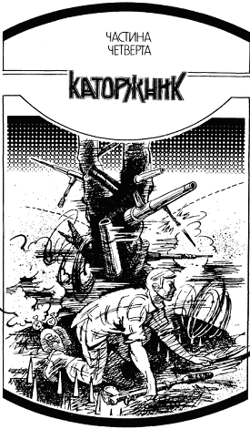 Ілюстрація до 4-ї частини книги братів Стругацьких "Населений острів".